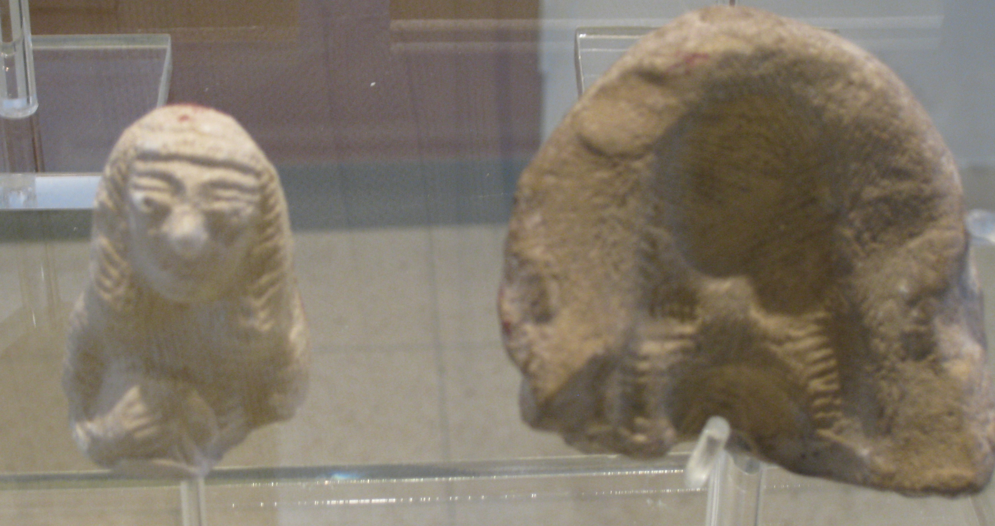 National Maritime Museum, Israel - Terracotta Figurines A stone mold and a modern cast. Second Israelite Period. 8th - 7th century BCE. The cast is of a women holding a disk or a tambourine המוזיאון הימי הלאומי בחיפה צלמיות עתיקות תבנית וצלמית חרס מודרנית שנצוקה בתבנית. התבנית עשויה אבן. התקופה הישראלית השניה. המאה השמינית או השביעית לפנה"ס. היציקה מתארת אישה המחזיקה דיסקית או תוף מרים